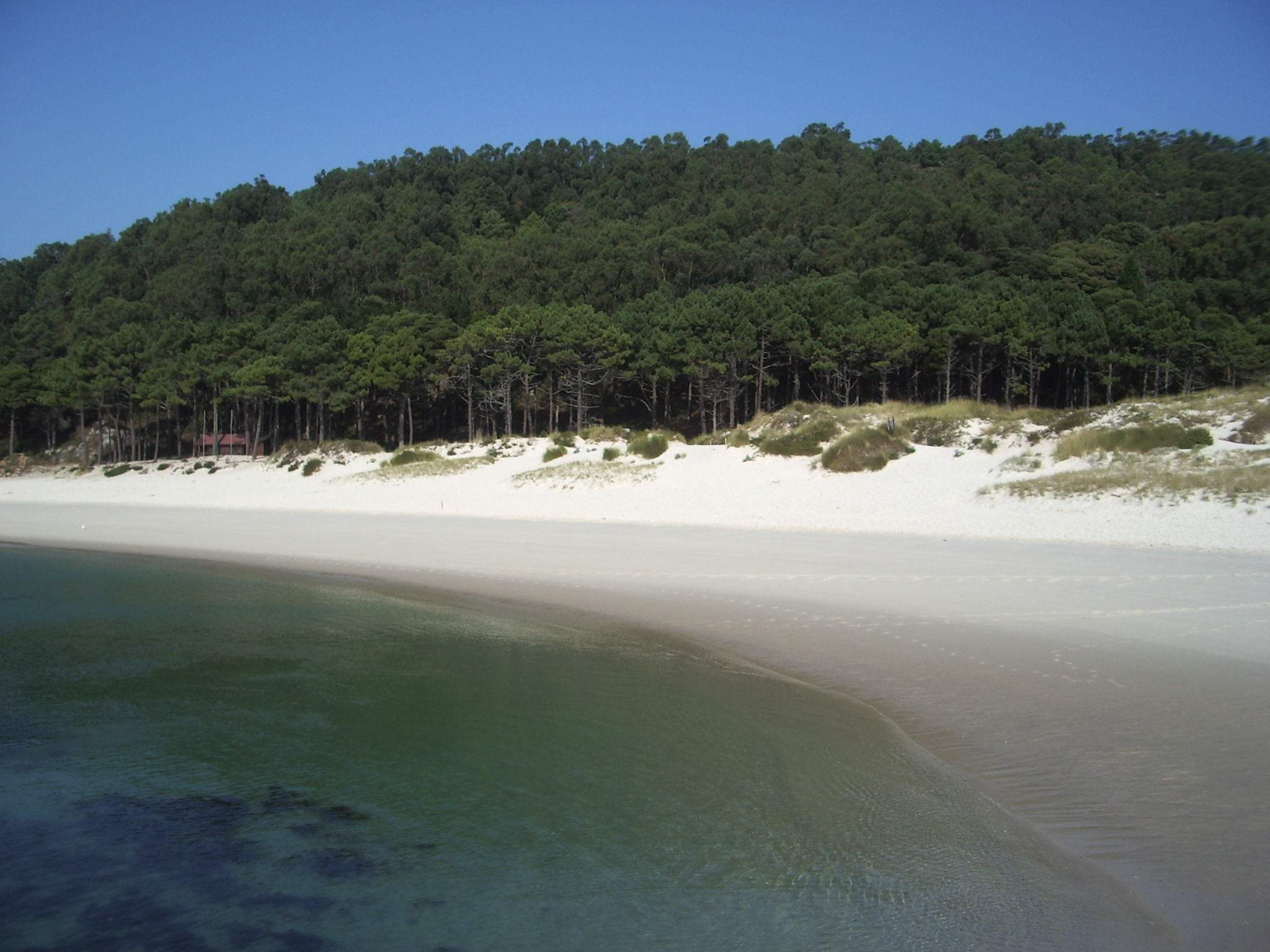 Vista parcial de orilla en la 'Praia das Rodas' (Illa do Faro - Islas Cíes - Galicia - España)